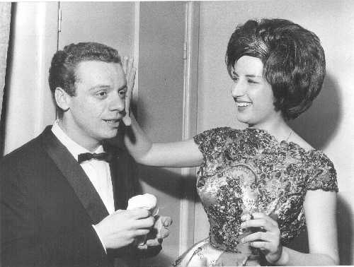 Johnny Dorelli con Mina in una pausa del Festival di Sanremo 1960. Licensing 1960 1960